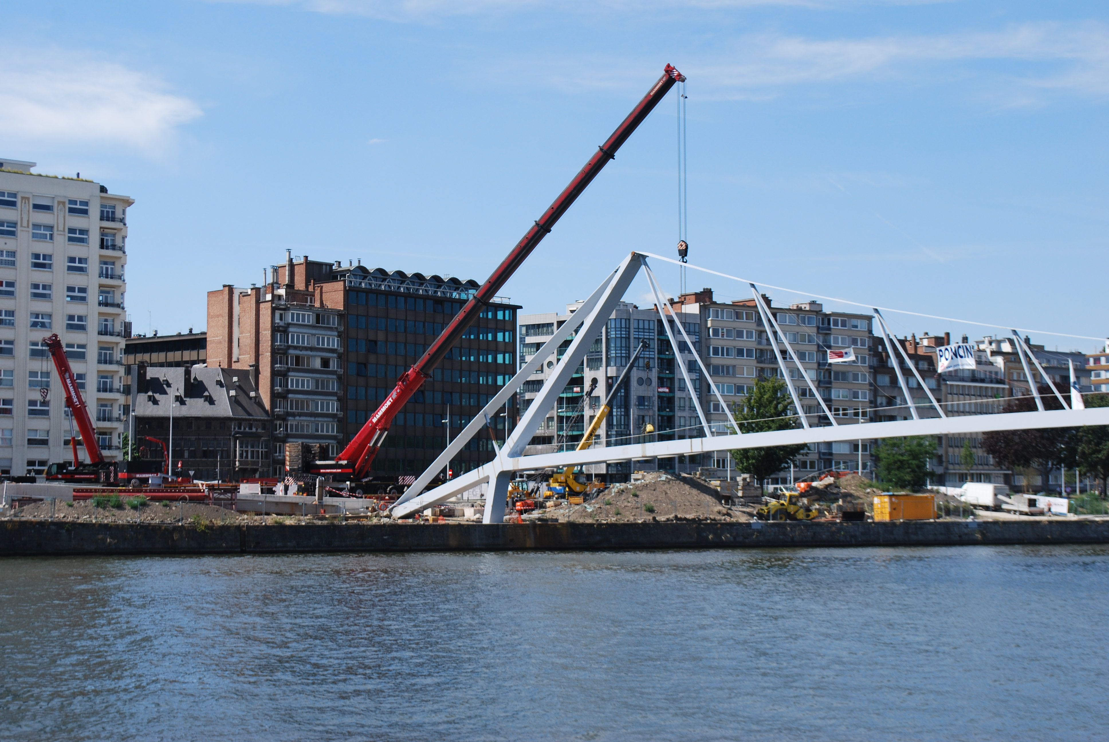 Vue du montage de la passerelle reliant le quartier des Guillemins au parc de la Boverie à Liège.